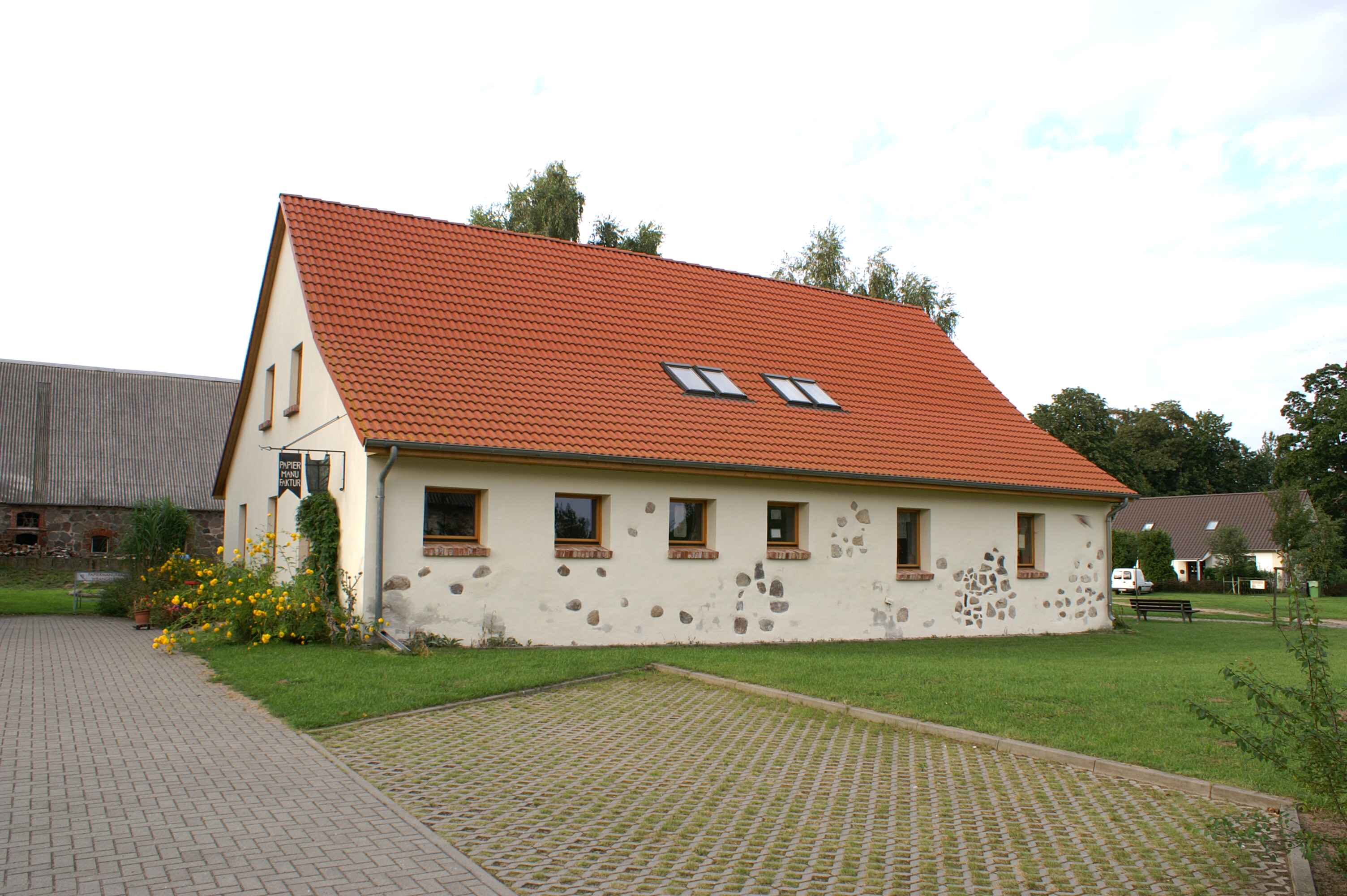 Wrangelsburg - Landkreis Ostvorpommern - Papiermanufaktur